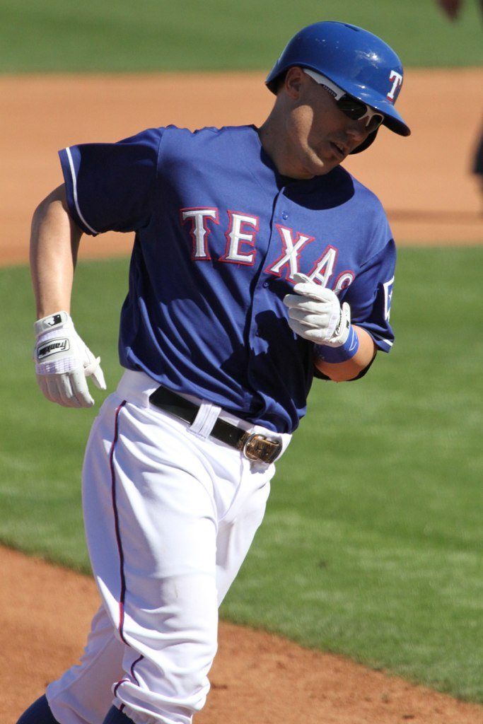 Jeff Baker